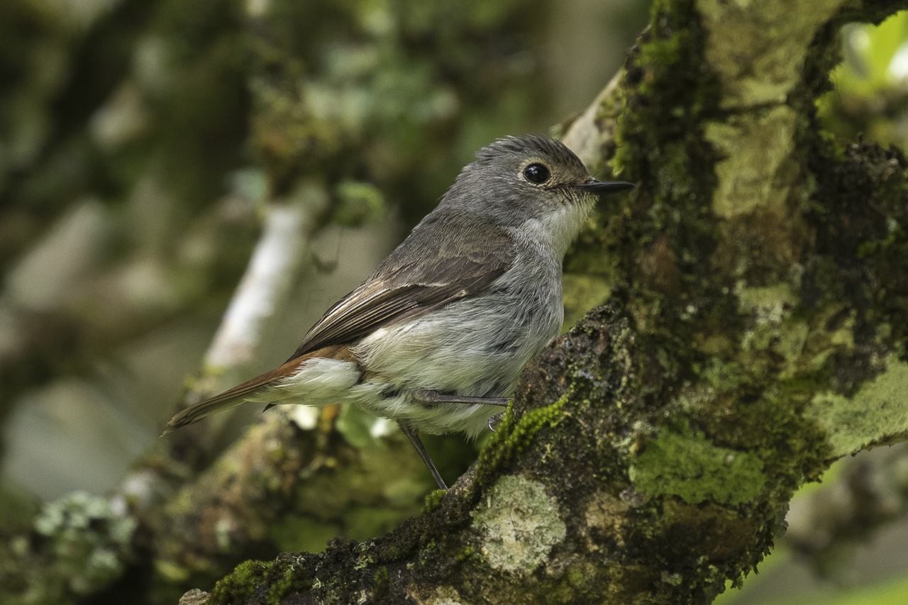 Little Pied Flycatcher fem - Gunung Gede - West Java_MG_3644